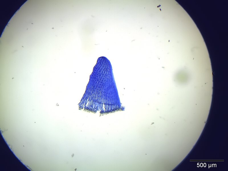 Schmalblättriges Torfmoos (Sphagnum angustifolium), Stammblatt, Vergrößerung: 40x